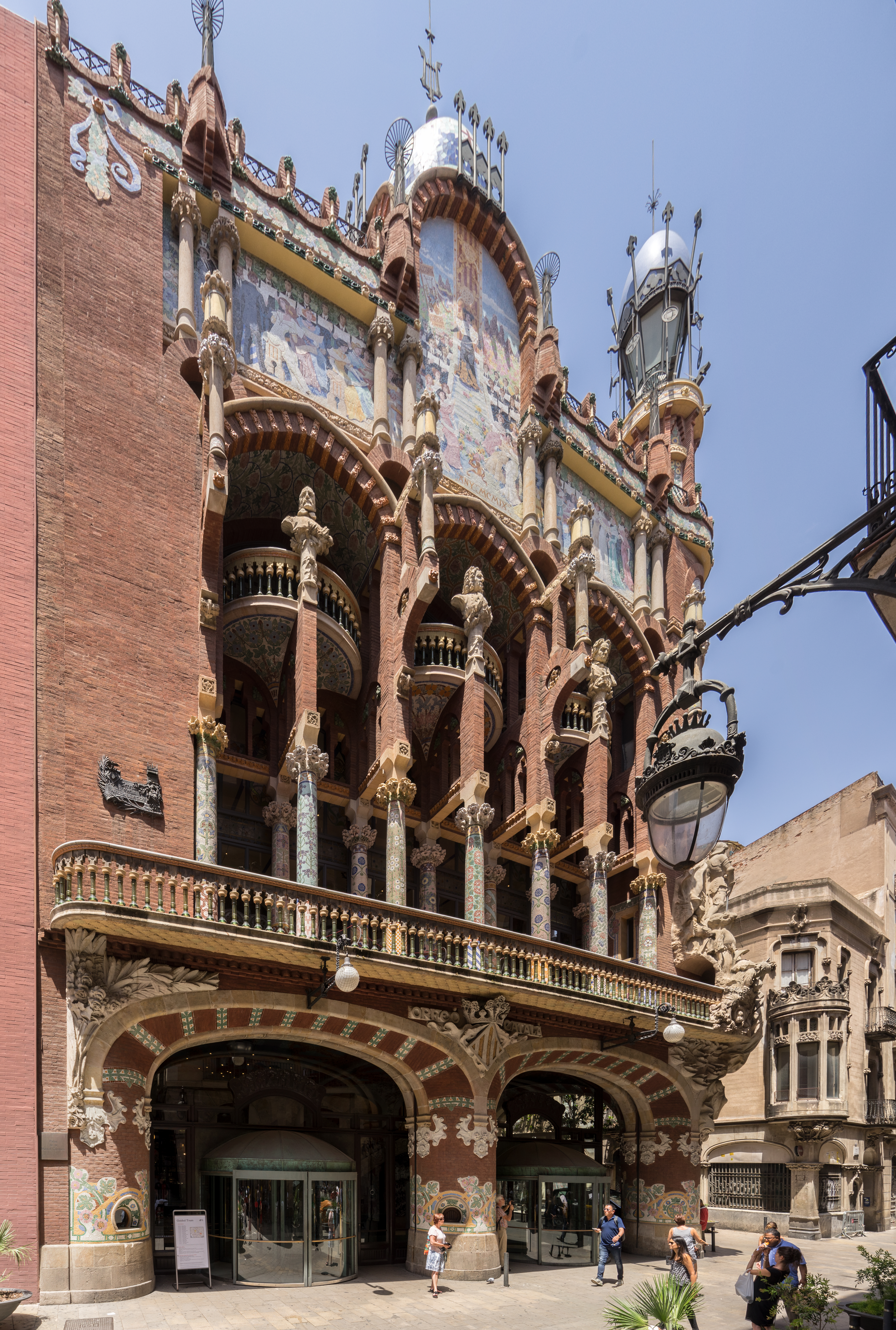 Palau de la Música Catalana, general view